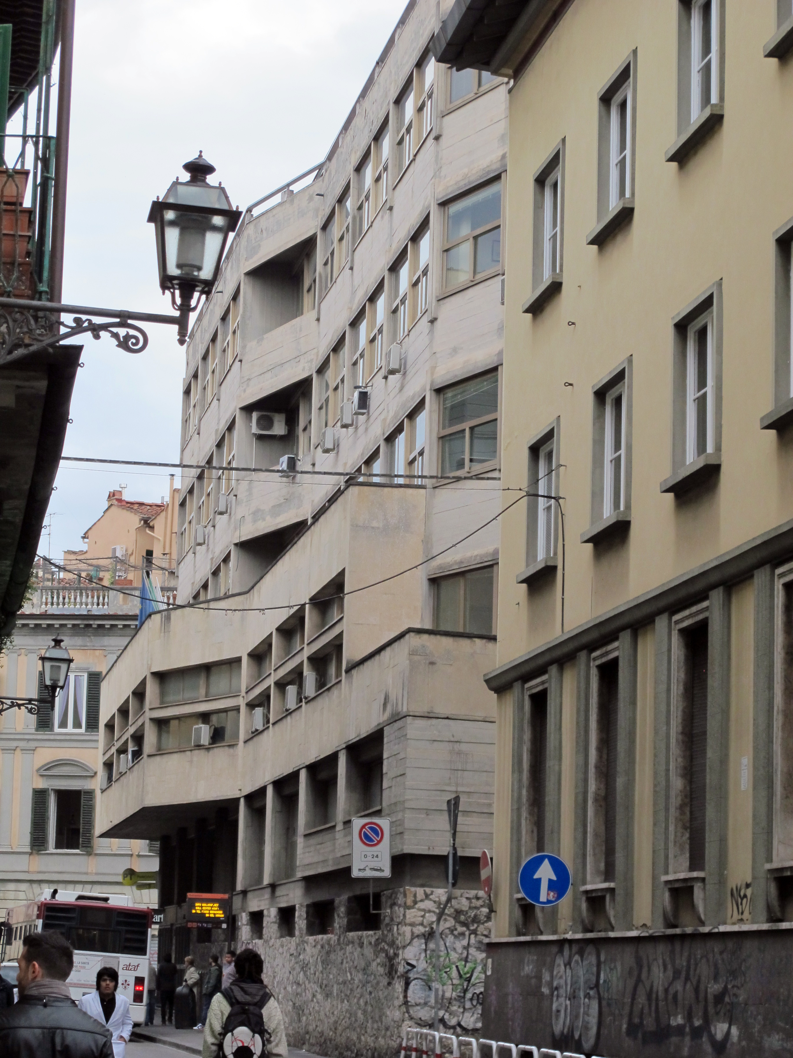 Via verdi, tratto finale